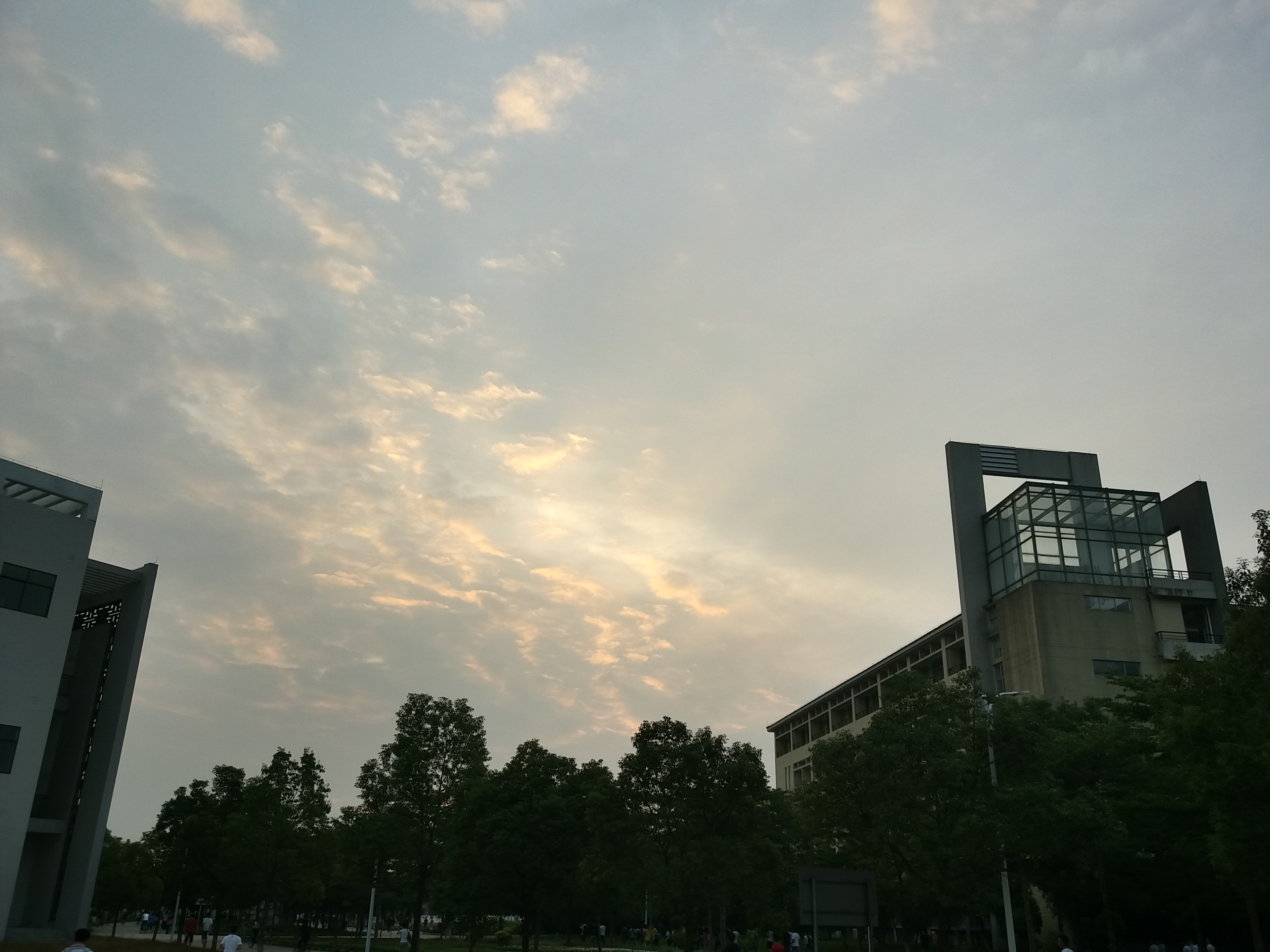 中文（中国大陆）: 电力楼一角